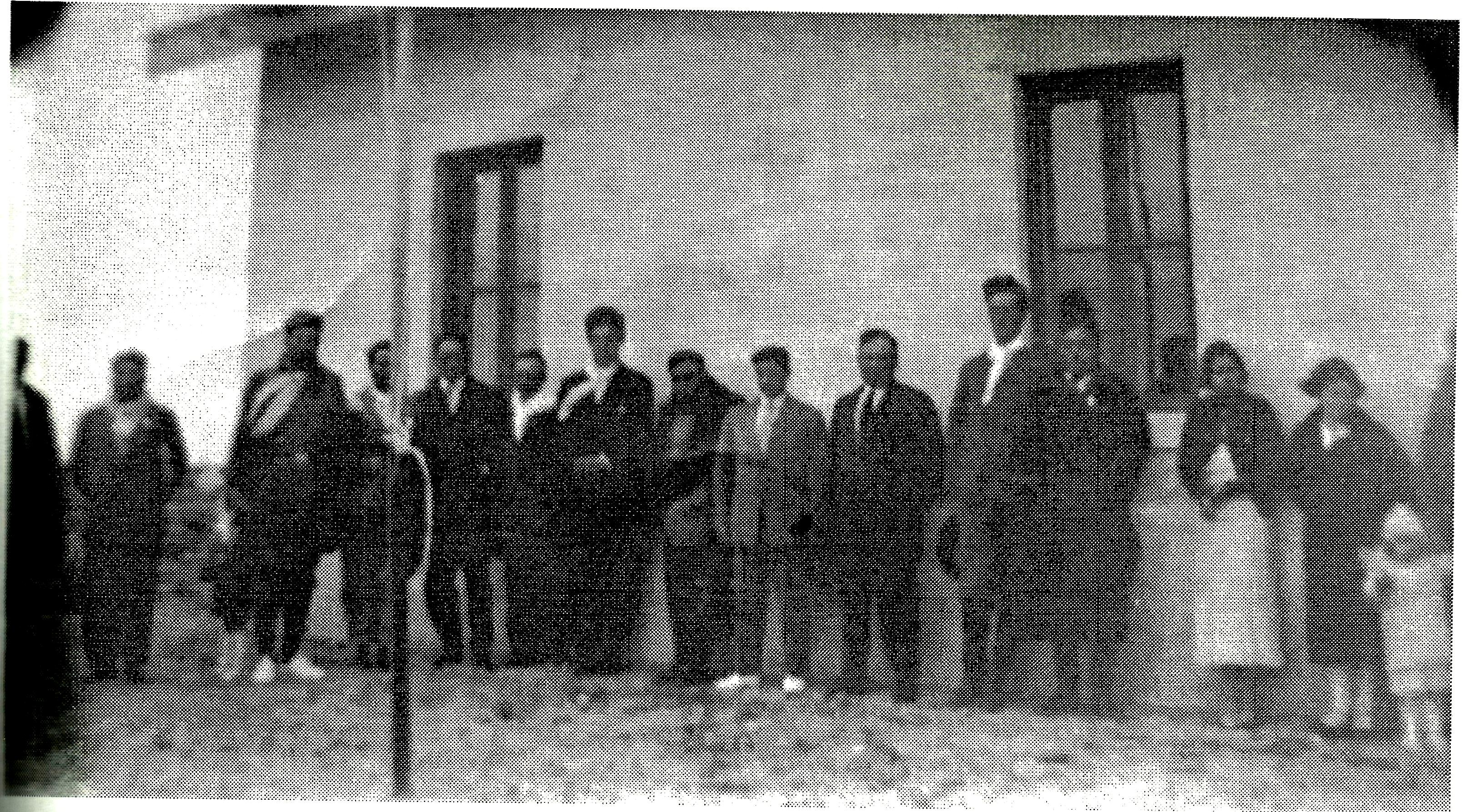 Gente reunida en la caseta caminero, que fuera también escuela